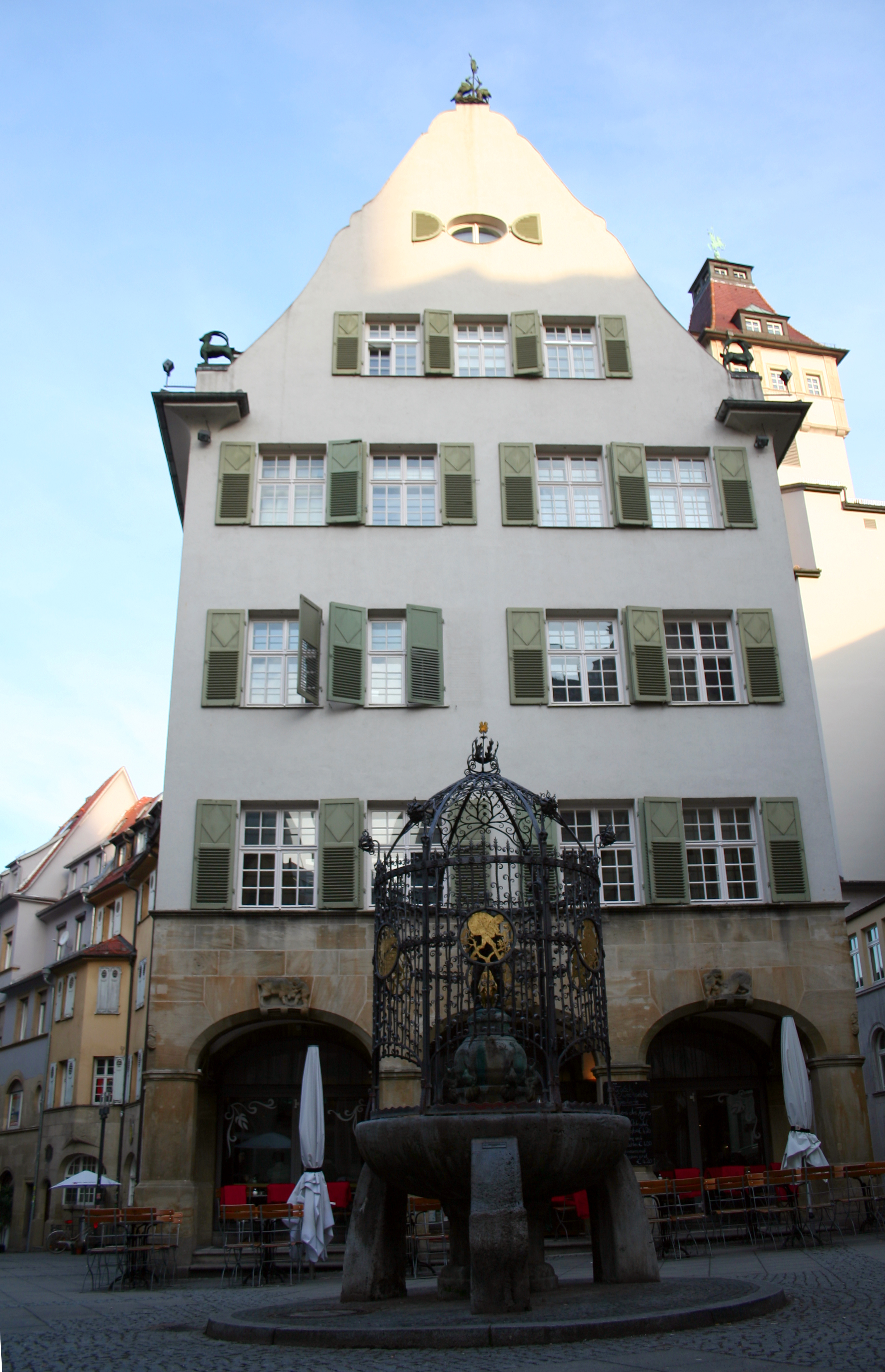 Vorderansicht des Hauses der Stiftung Geißstraße Sieben in der Geißstr. 7, Stuttgart, Foto: Inari